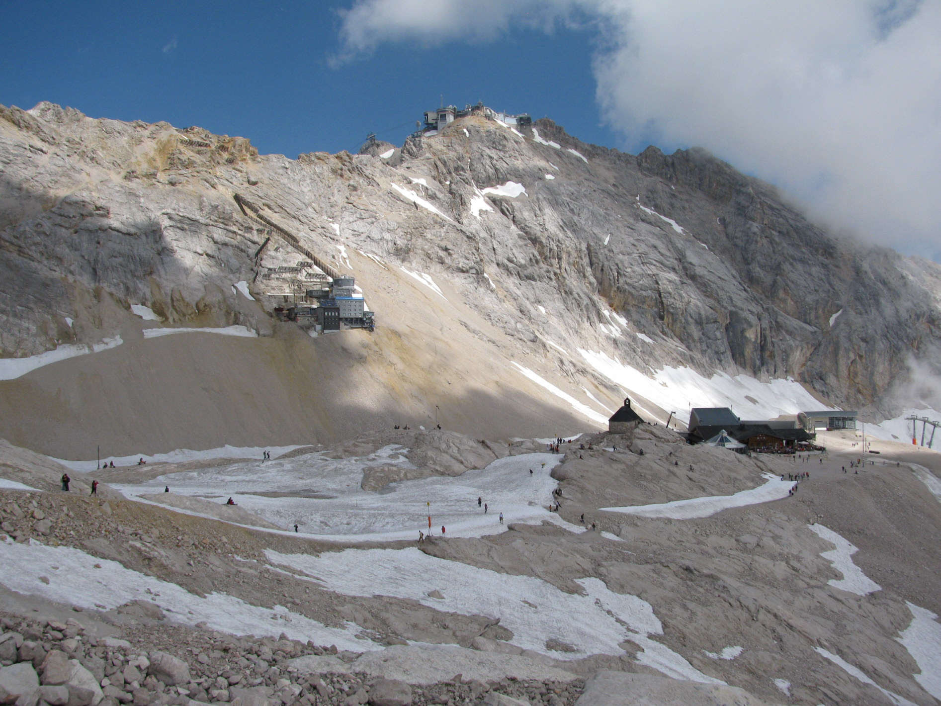 Panoramaansicht der Zugspitzstation